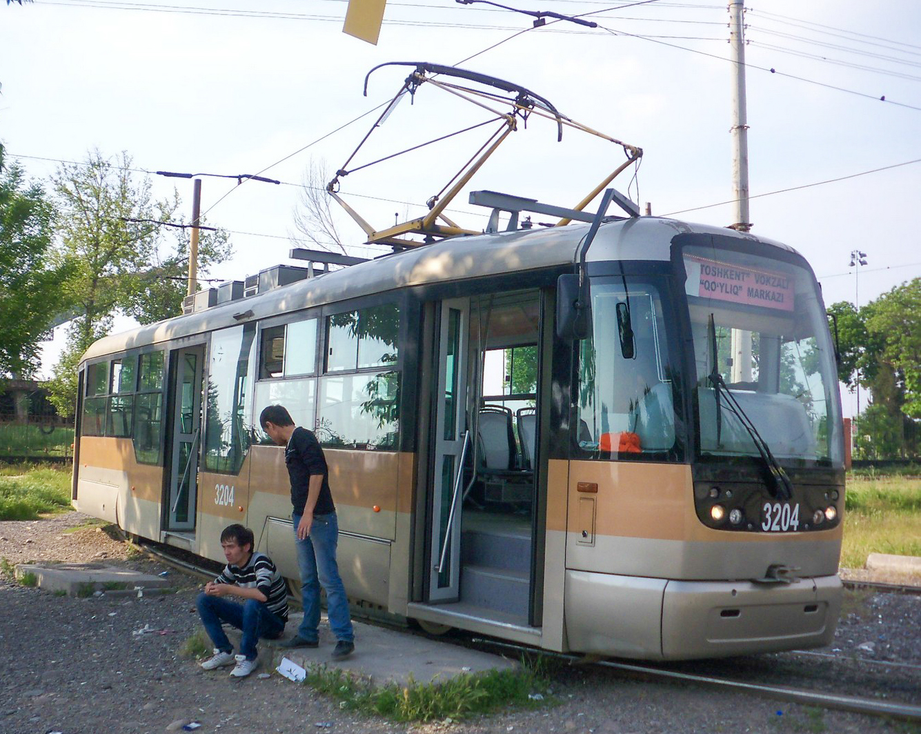 Трамвай Vario LF № 3204 в Ташкенте